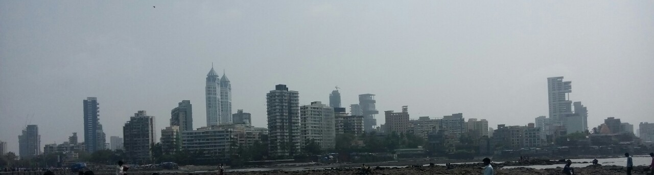 Tardeo from Haji Ali Darga.